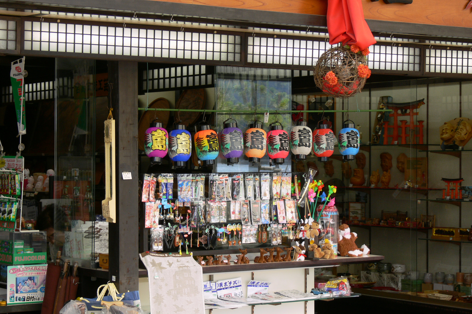 宫岛